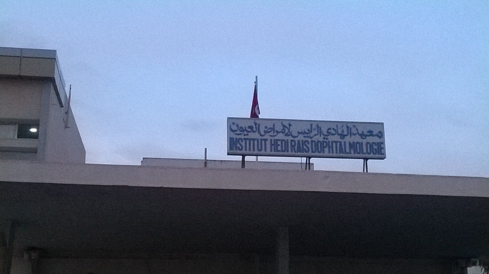 Bab saadoun